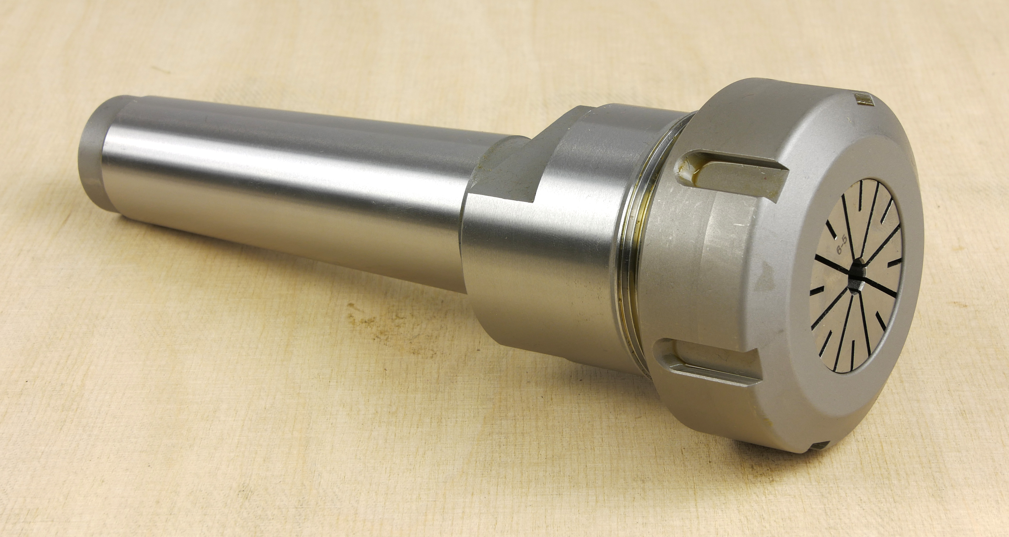 Oprawka zaciskowa Morse do tulejek ER